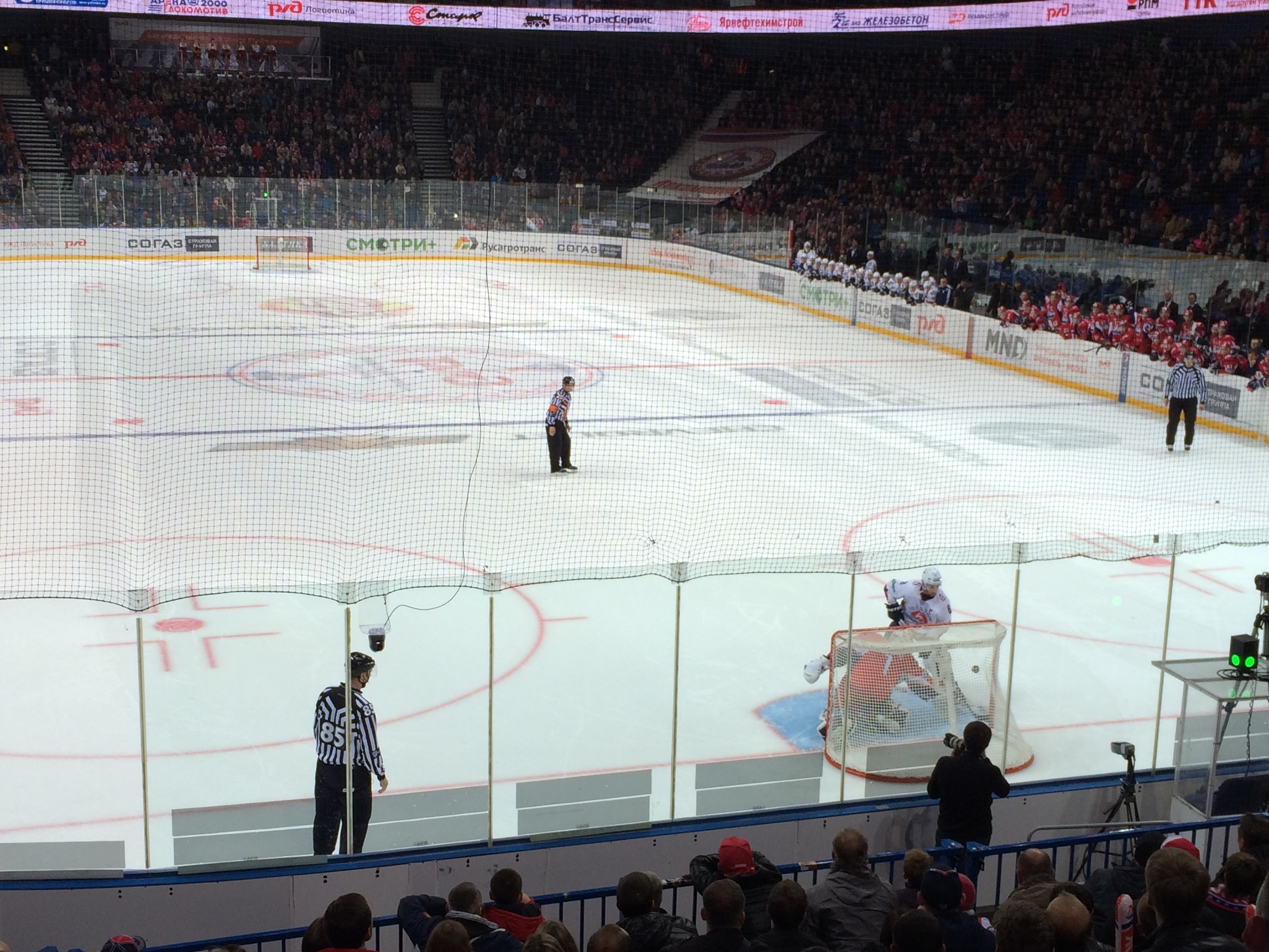 Игрок ХК «Торпедо» Войтек Вольский забрасывает шайбу в ворота ХК «Локомотив» в серии буллитов